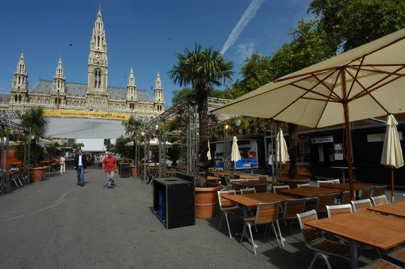 "Carmens Corner", der gastronomische Teil des Filmfestivals auf dem Rathausplatz in Wien - letzte Vorbereitungen